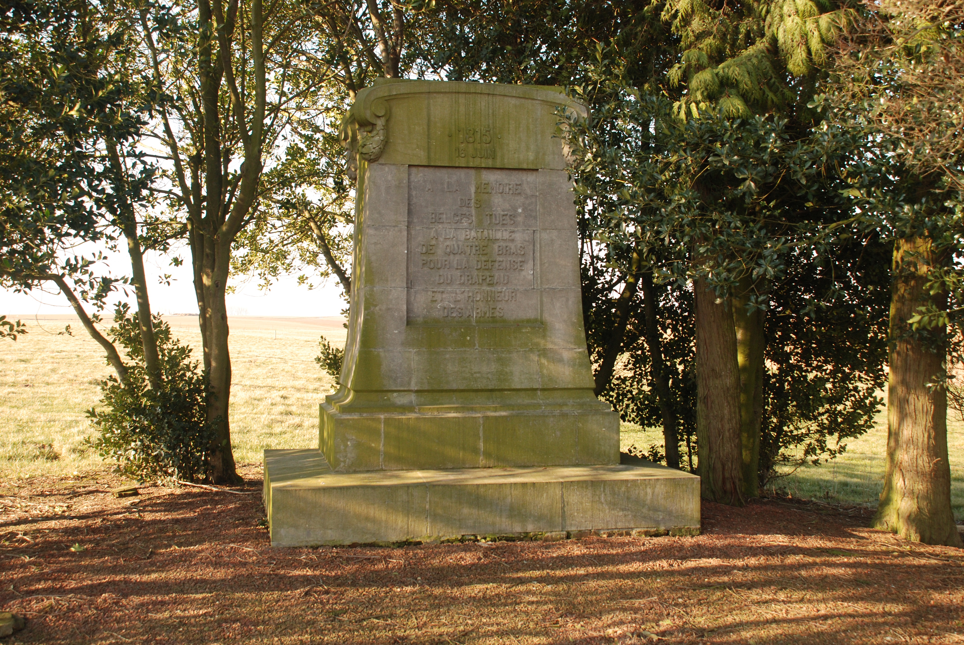 Belgique - Brabant wallon - Genappe - Monument aux Belges (Quatre Bras)